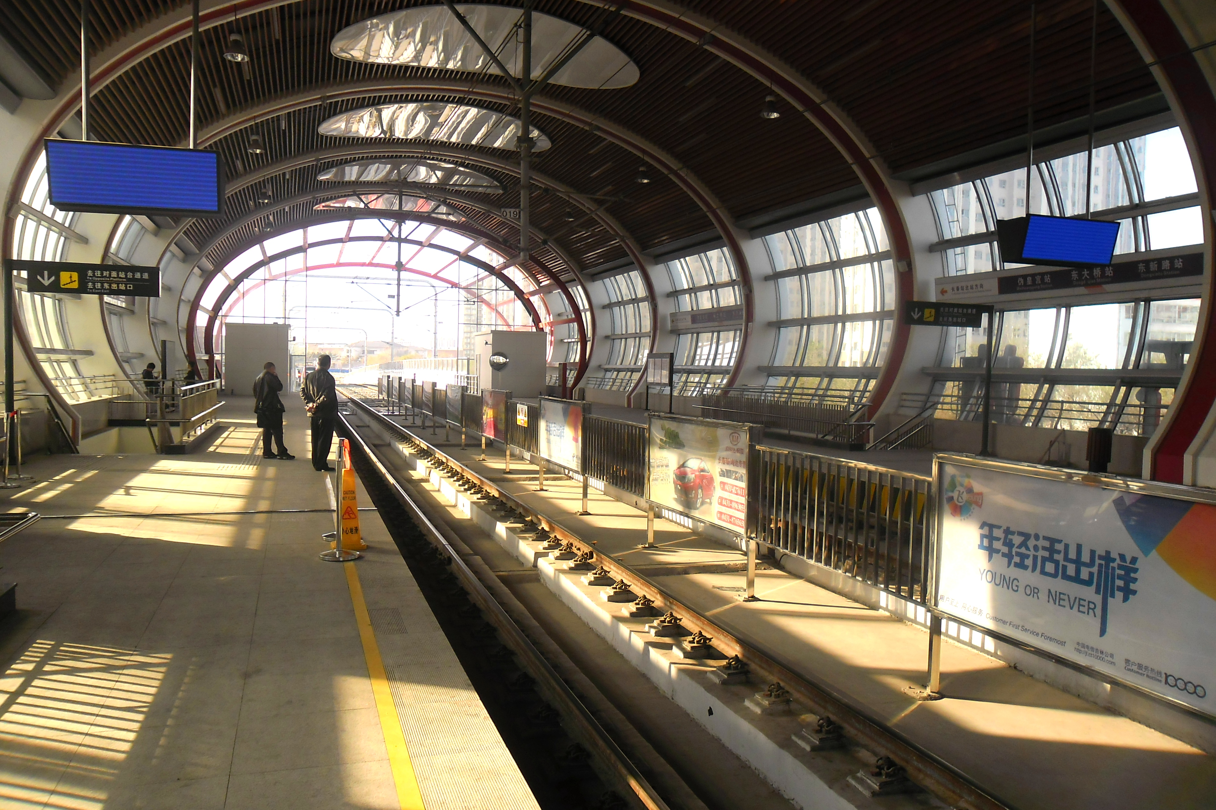 中文（中国大陆）: 长春轻轨四号线东大桥站